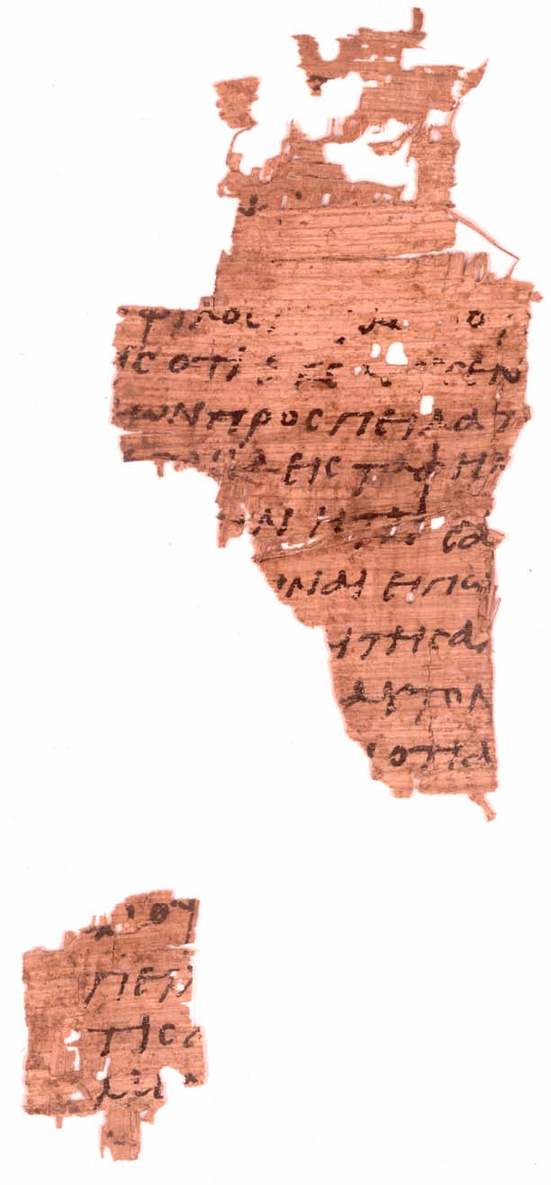 Papiro Oxy. XLI 2949, forse frammento di vangelo apocrifo, Sackler Library, Oxford